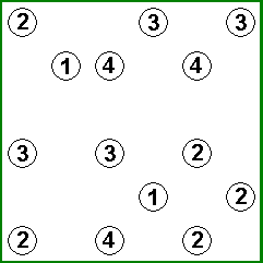 Egen teckning